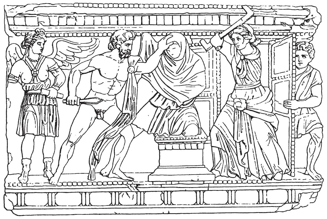 Agamemnons Ermordung